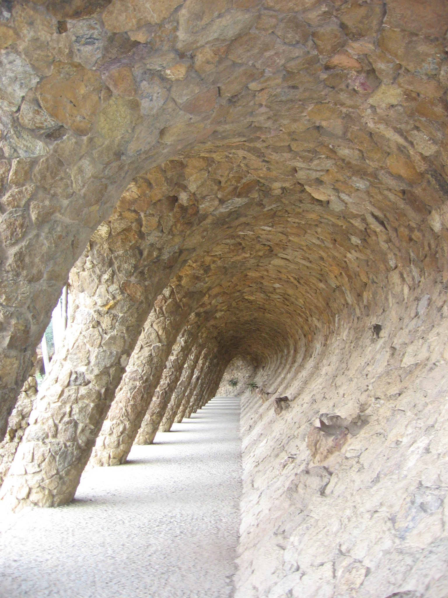 Parque Güell (Barcelona), de Antoni Gaudí